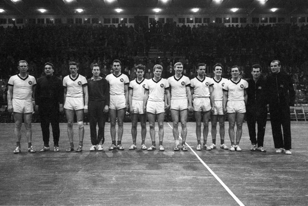 in der Ostseehalle. Im Bild die Handballmannschaft vom Berliner SV 92 als Deutscher Meister 1964.